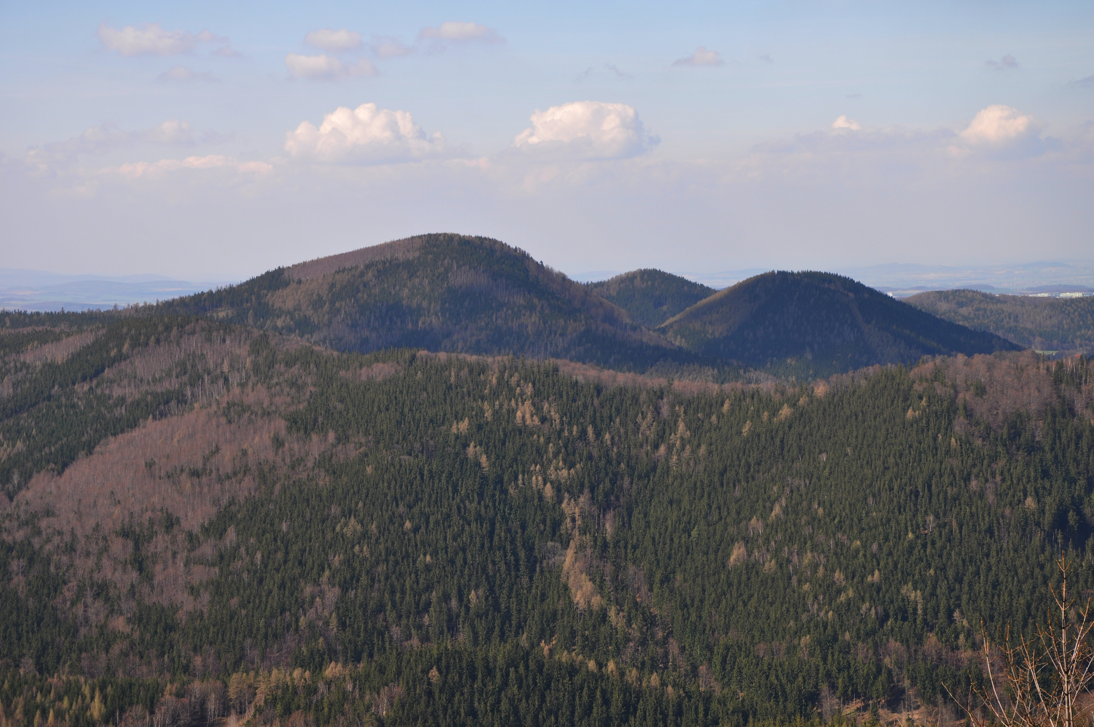 Borowa i Sucha, (a między nimi Wołowiec), Góry Wałbrzyskie widziane ze szczytu (ruin zamku) góry Rogowiec